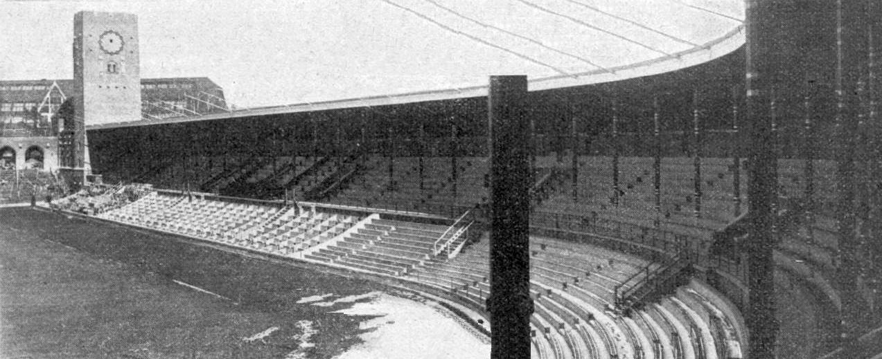 Le stade de Stokholm pour les JO de 1912.